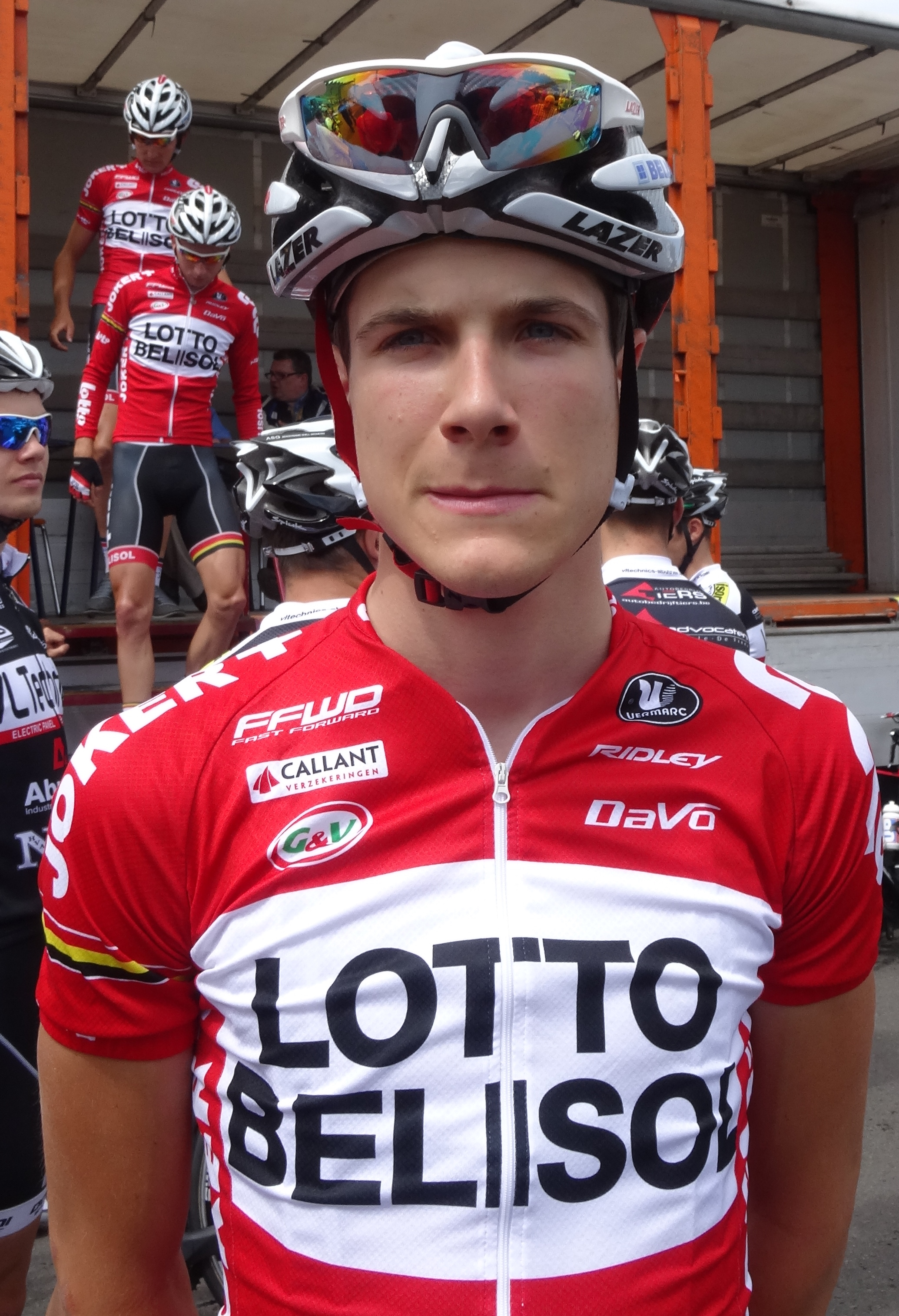 Reportage photographique réalisé le dimanche 8 juin à l'occasion du départ du Mémorial Philippe Van Coningsloo 2014 à Wavre, Belgique.